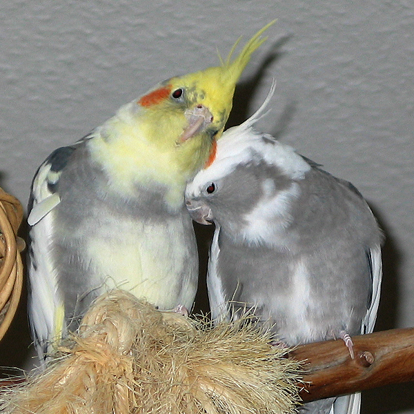 Nymphensittichpaar links= wildfarbig gescheckter Hahn, rechts= weißkopfgescheckte Henne